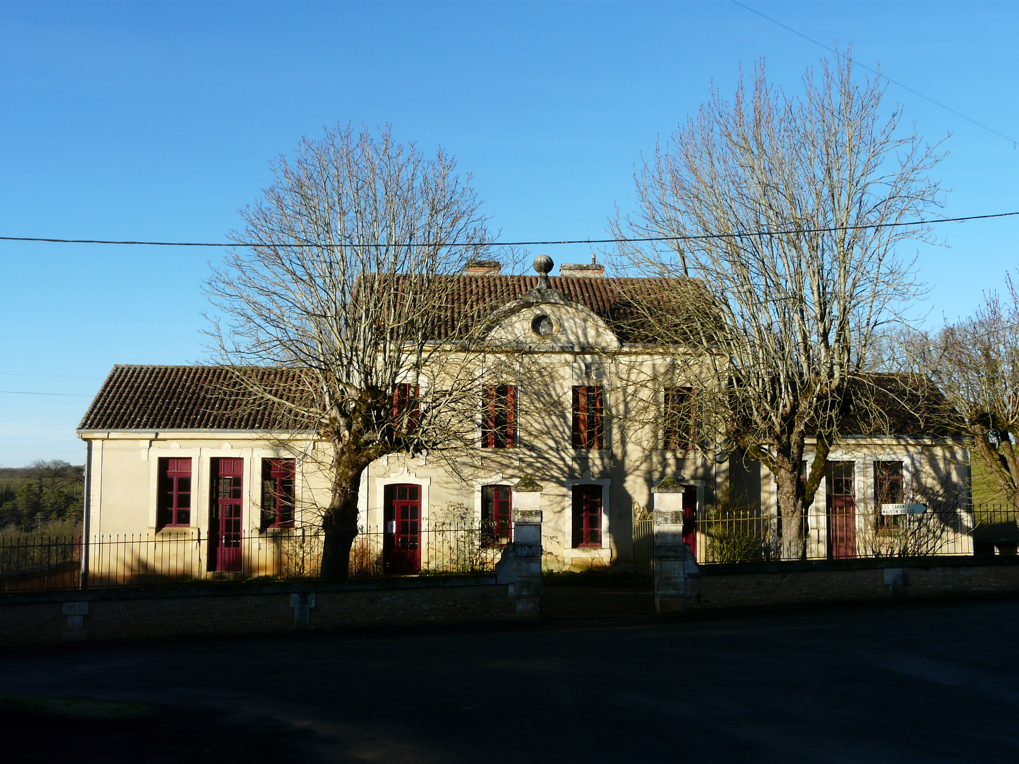 L'ancienne école de Veyrines-de-Vergt, Dordogne, France.